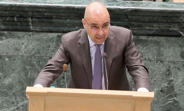 طارق خوري - عضو البرلمان الأردني